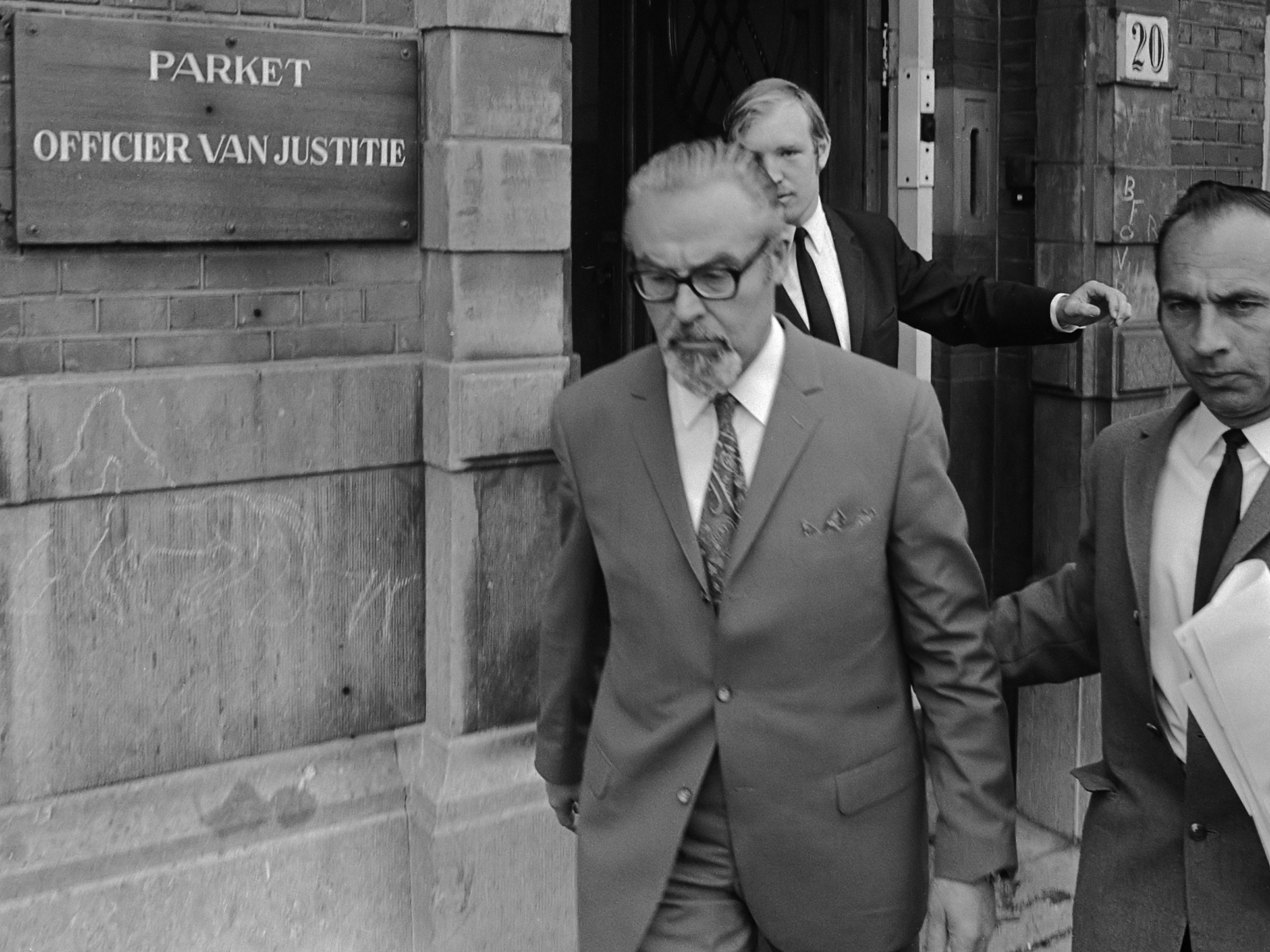 Verwey verlaat het gebouw van de Officier van Justitie 24 mei 1971